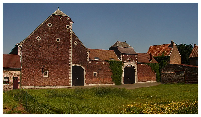 Begijnhofhoeve bij Sint-Agnes-begijnhof, Sint Truiden